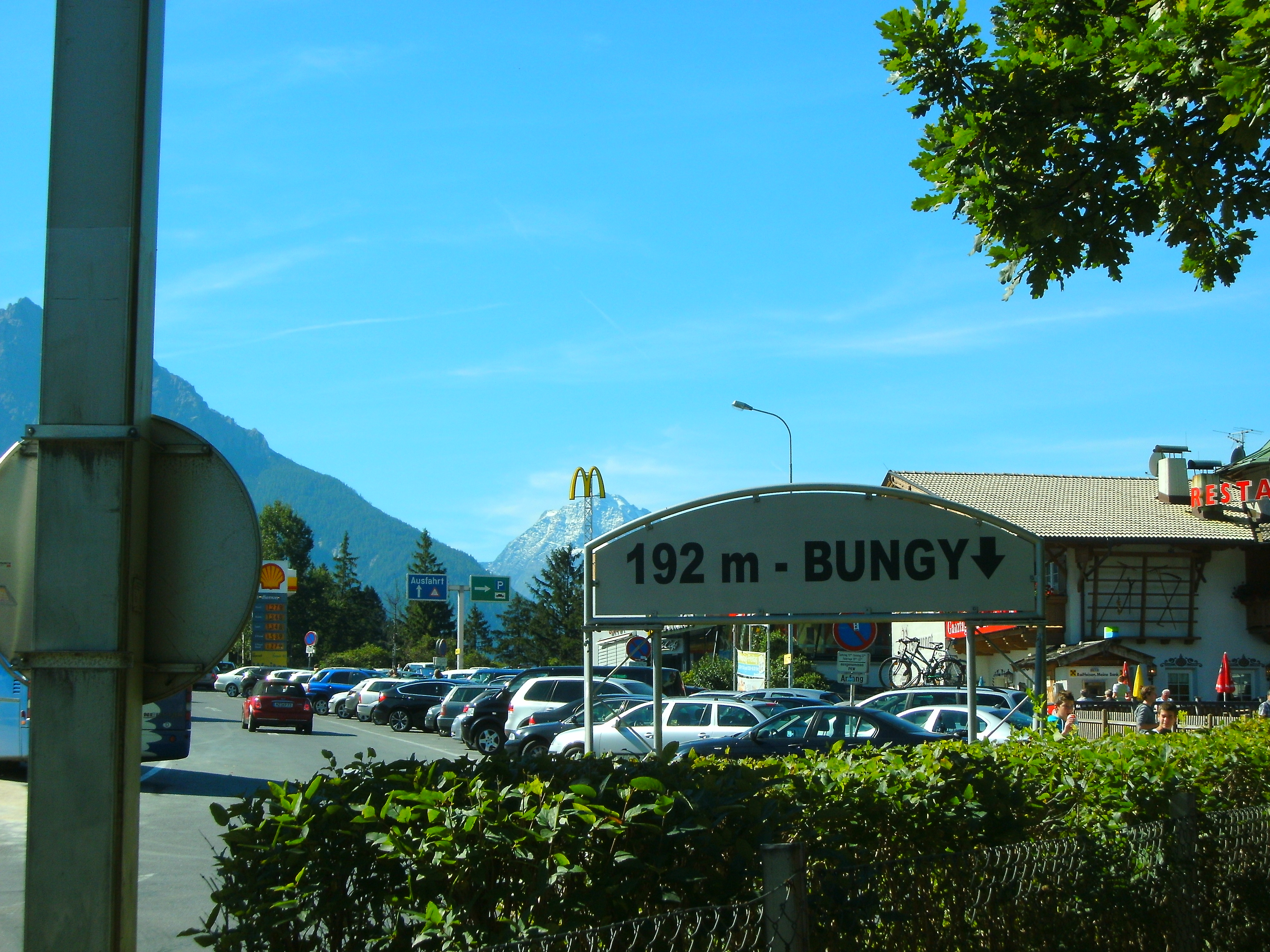 Europabrücke - Rastplatz Europabrücke